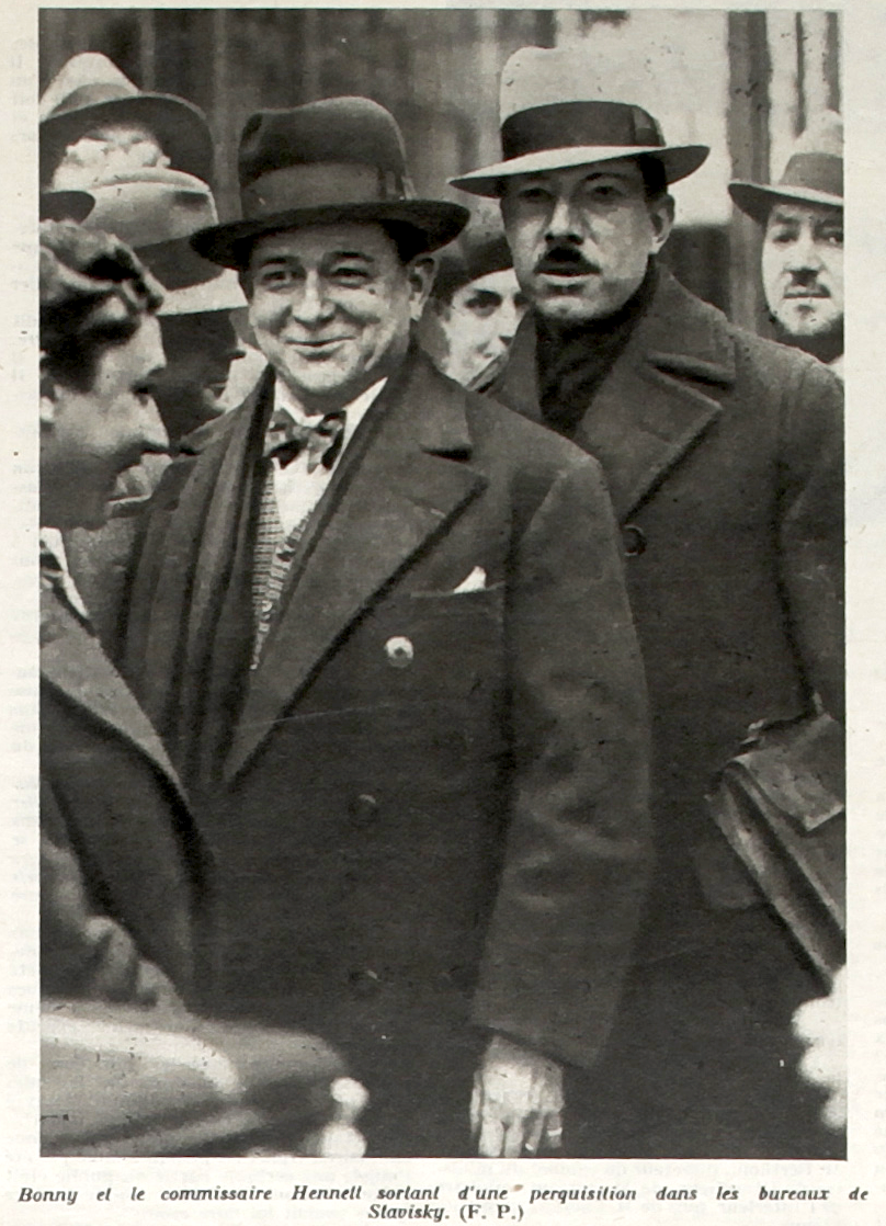 Le commissaire John Hennet et son subordonné l'inspecteur Pierre Bonny, de la Sûreté générale, sortant d'une perquisition lors de l'affaire Stavisky. Publié dans Police Magazine, 6 janvier 1935.